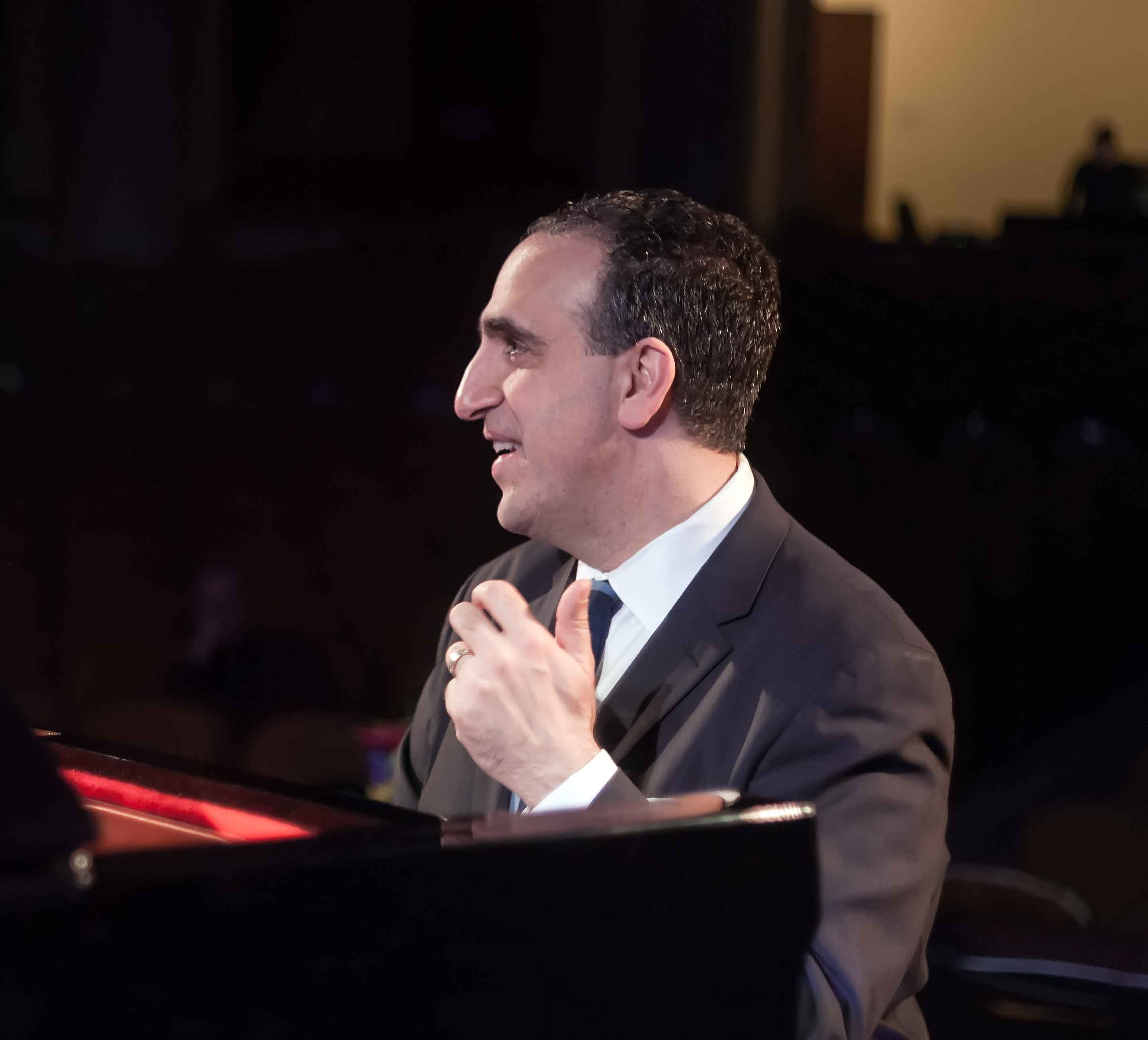 вечер джаза